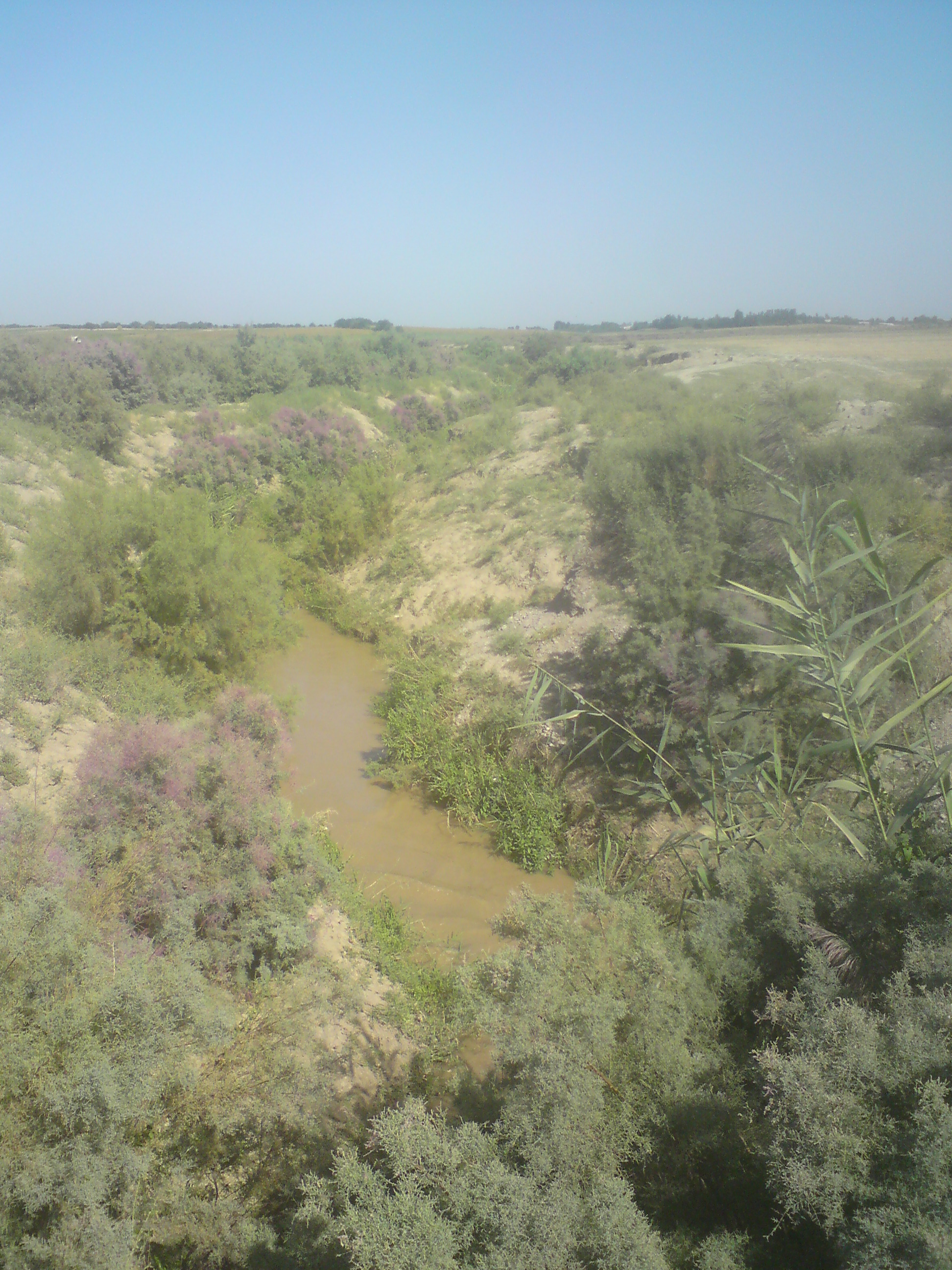 Канал (исторически - естественная протока Чирчика) Джун, незадолго до впадения в Нижний Бозсу, близ населённого пункта Кумчуккуль, Чиназский туман, Ташкентский вилоят, Узбекистан